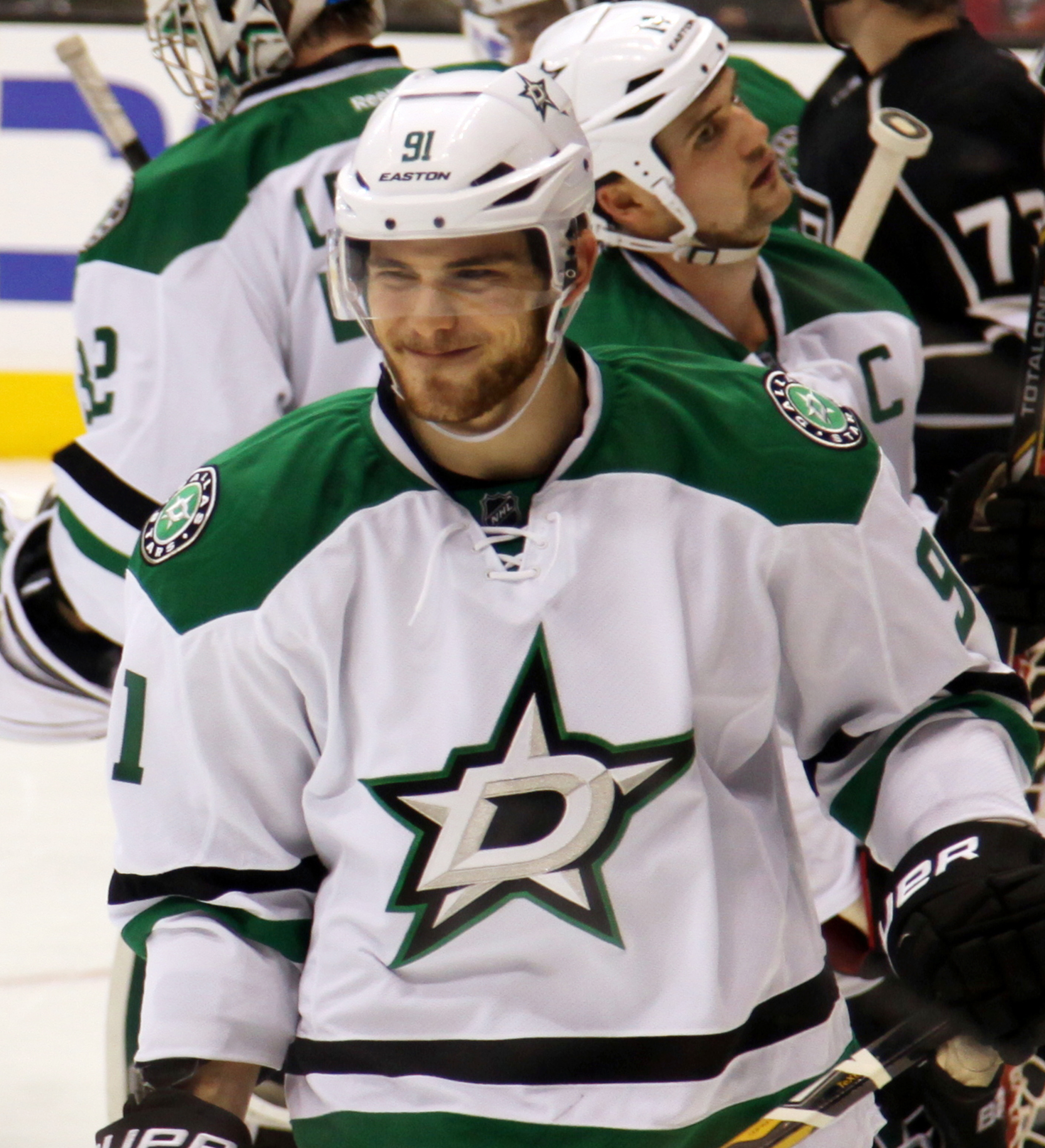 Seguin in 2013.